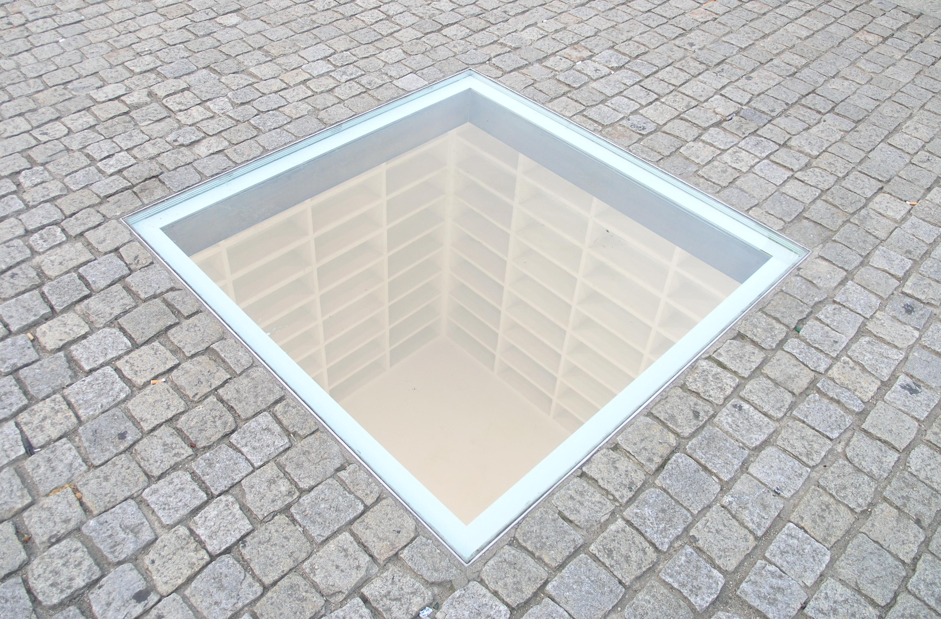 Denkmal der Buecherverbrennung Bebelplatz Berlin, 2008